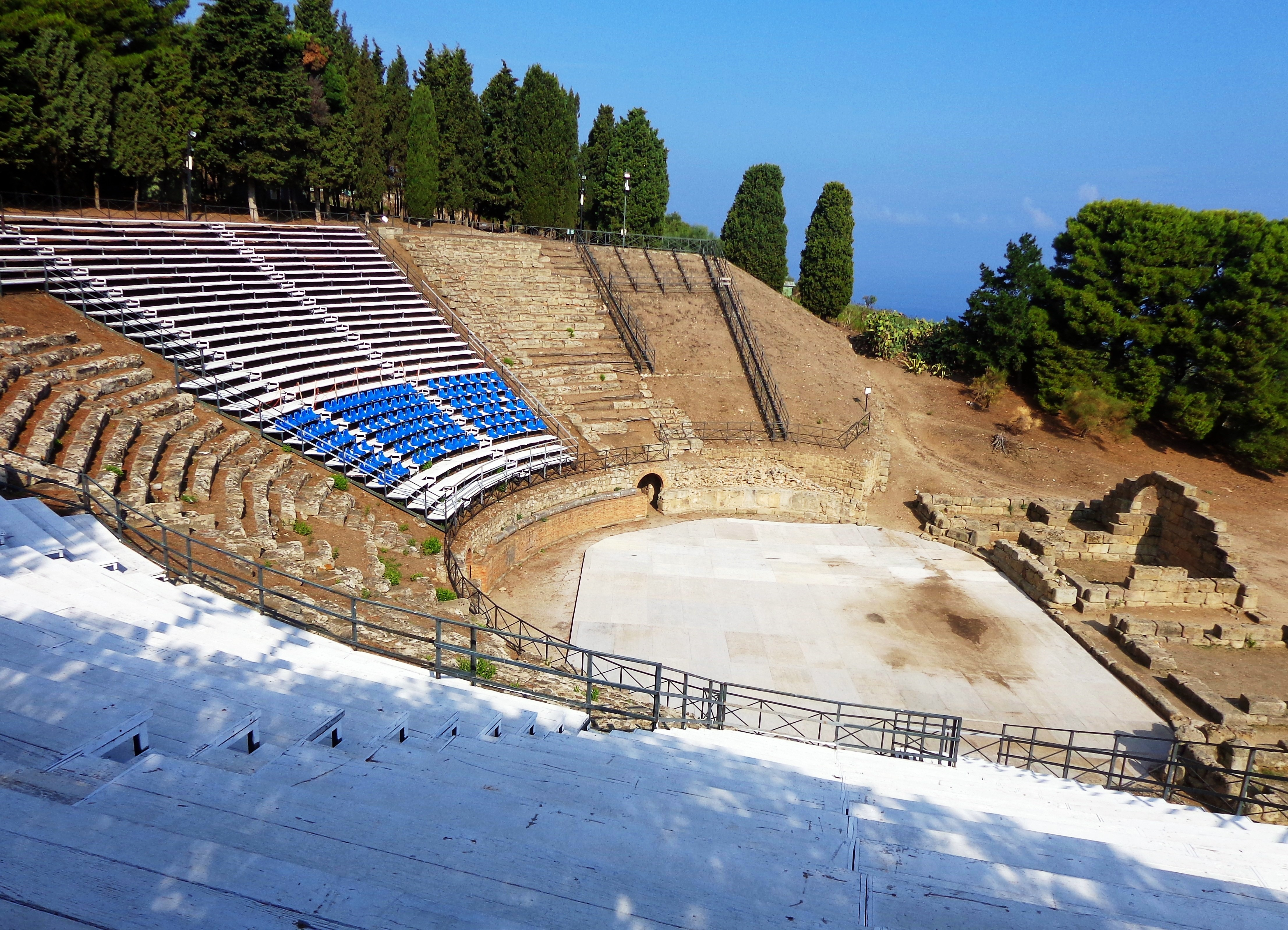 Teatro - panorama. 08 settembre 2012 (Escursione Tindari, Santuario e area archeologica). Scatto fotografico altresì presente negli album caricati sui profili personali di Facebook, Panoramio, Google, etc.